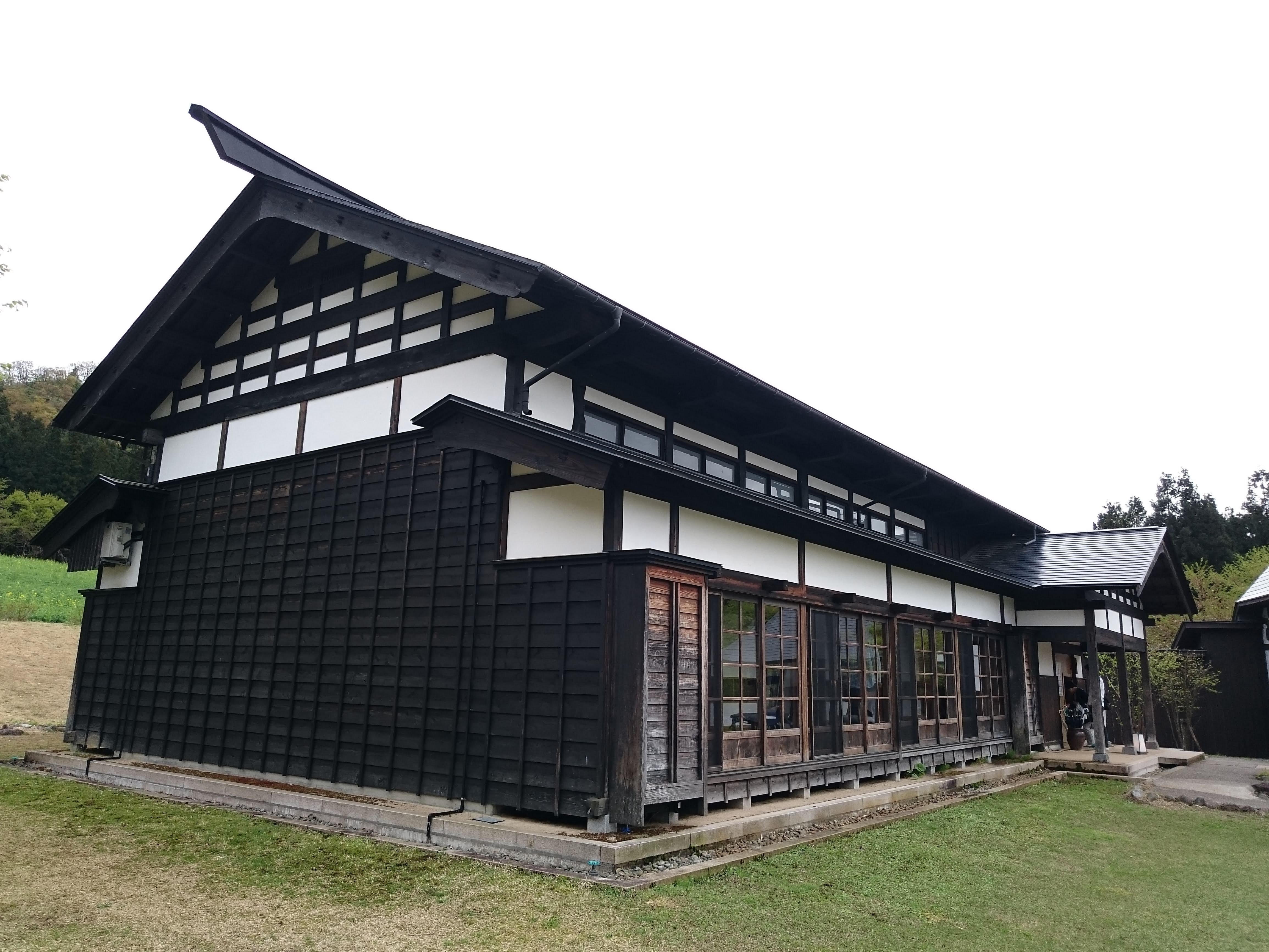 つつみや八蔵の外観